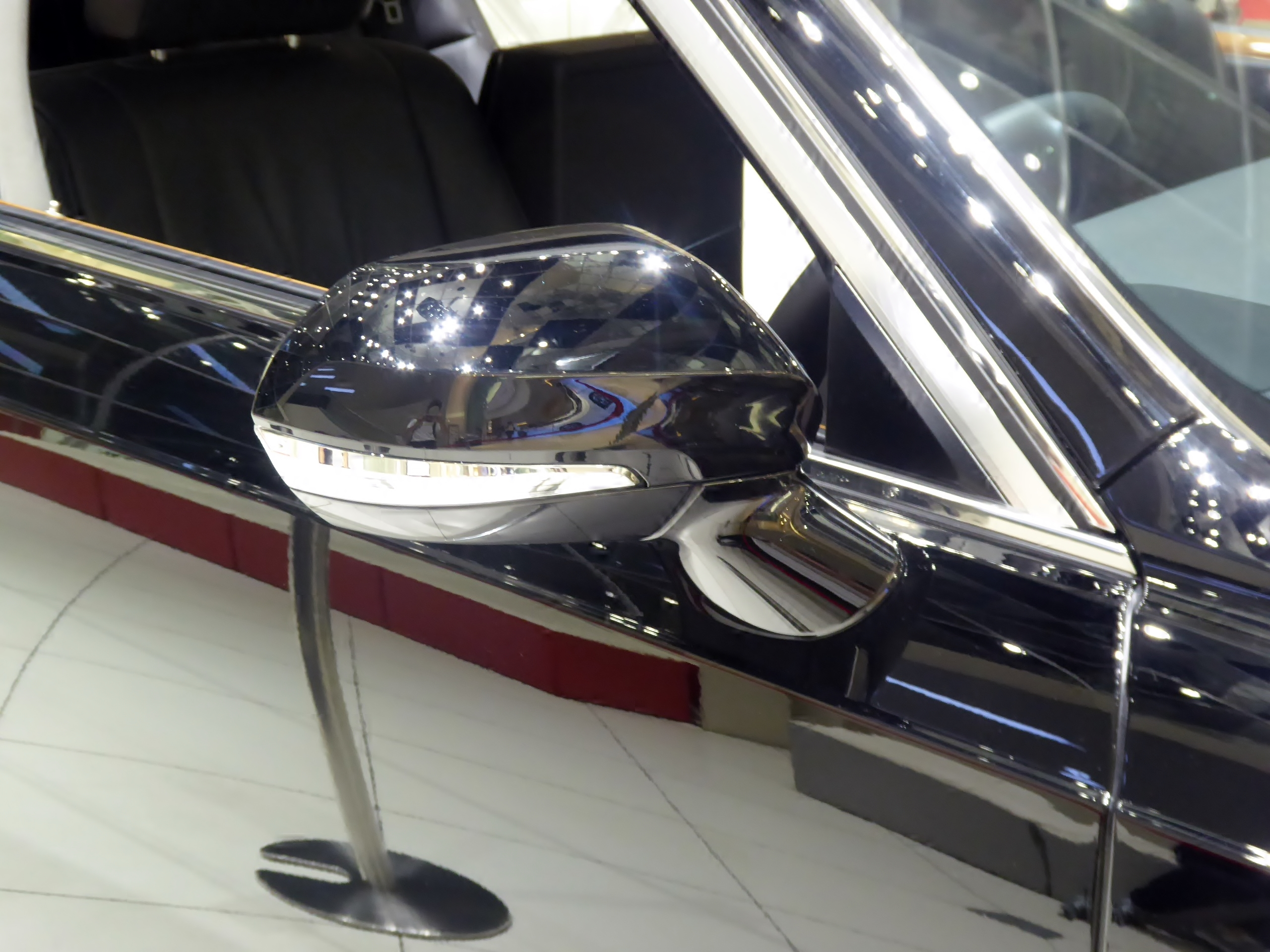 DAA-UWG60-AEXGH型トヨタ・センチュリーのドアミラーを撮影。2代目まで採用されていたフェンダーミラーは3代目に於いては廃止されている。